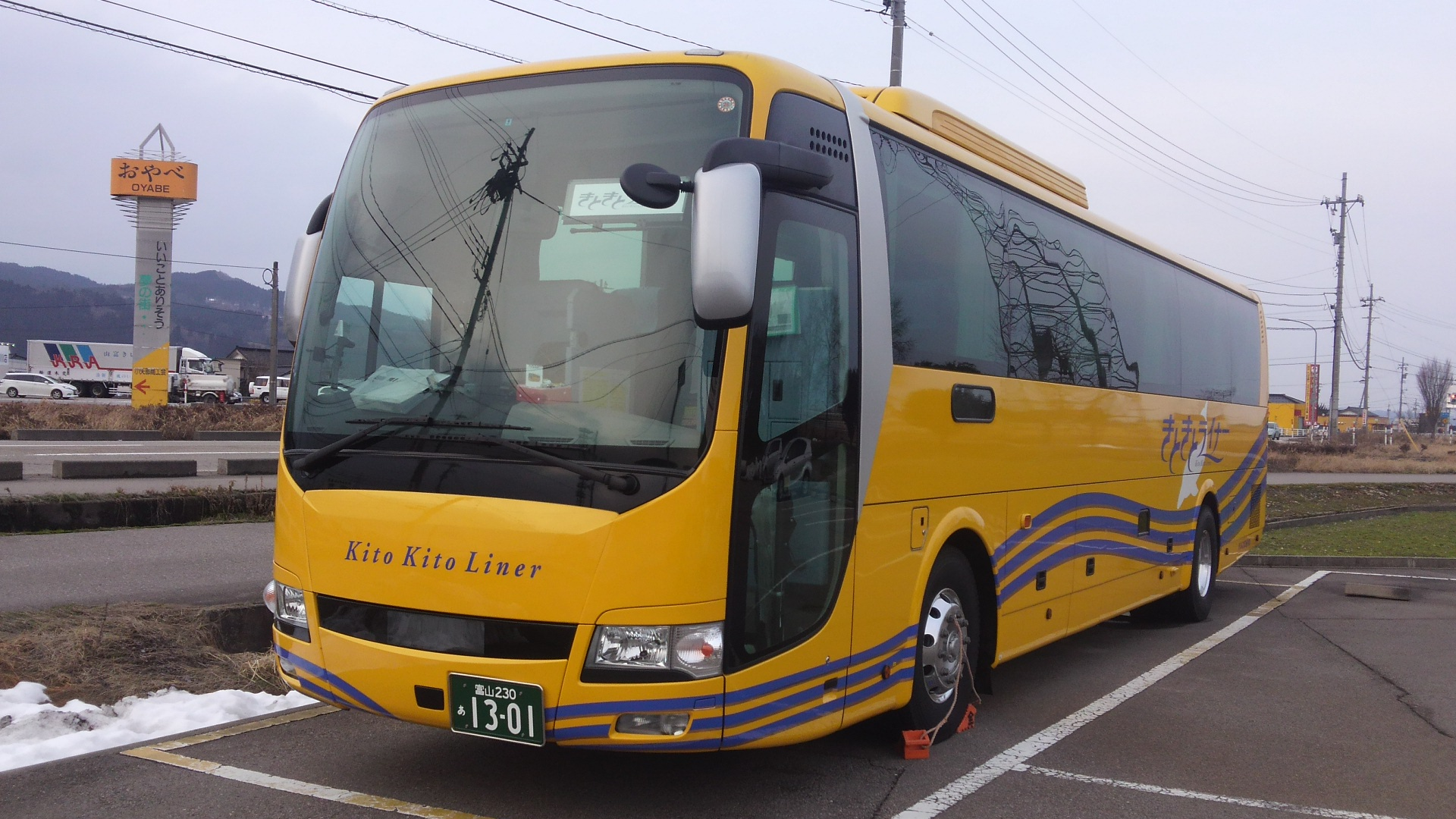 ツアーバス「ドルフィンライナー」運行を経て、2013年8月より路線バスとして再スタートした「きときとライナー・東京線」。